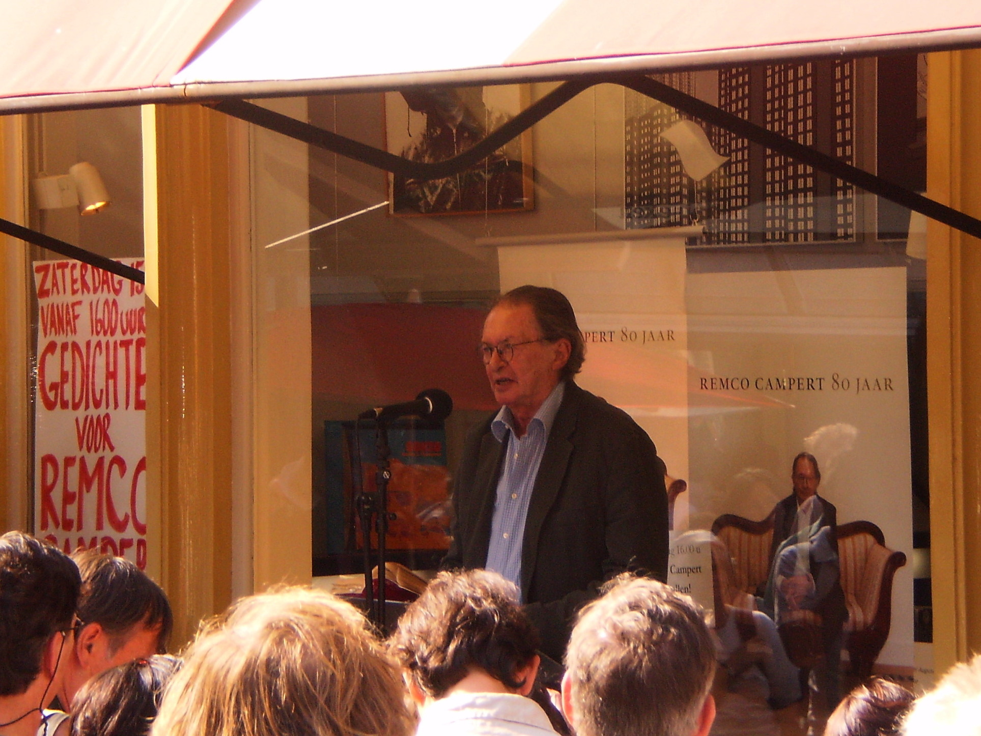 Remco Campert leest voor uit eigen werk op een gedichtenmiddag bij zijn 80e verjaardag. Athenaeum Boekhandel, Spui, Amsterdam